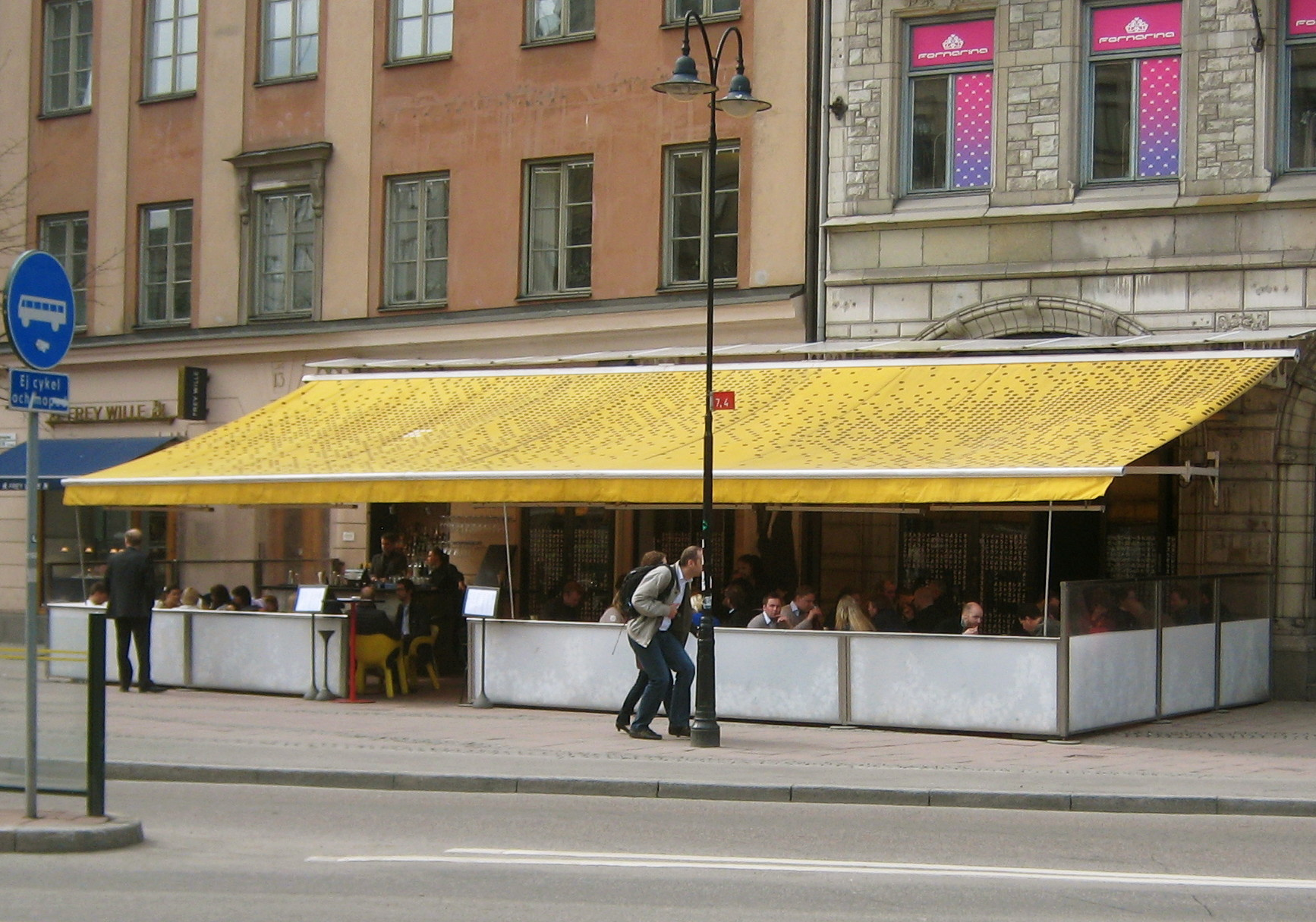 Restaurang East vid Stureplan i Stockholm (f.d. "Brända tomten")